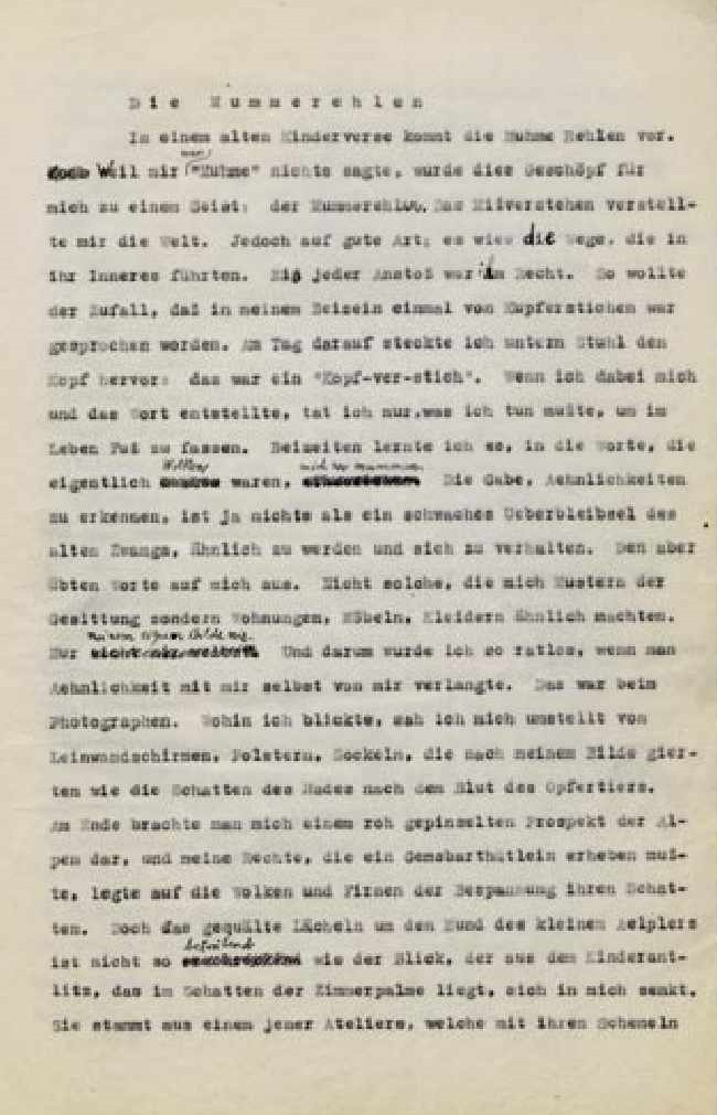 Walter Benjamins Manuskript »Die Mummerehlen« , Berliner Kindheit um neunzehnhundert, Gießener Fassung (Universitätsbibliothek Gießen, Sammlung Walter Benjamin)